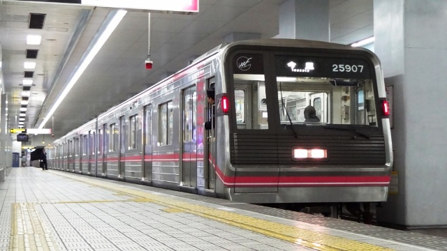 大阪市営地下鉄千日前線今里行最終電車。